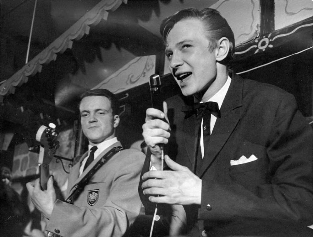 Den ambitiöse seriöse skådespelaren Lasse Passgård har blivit twist-sångare. Men bara på film! I denna egenskap framträder man i filmen "Barnvagnen" – som är under inspelning i Malmö. Scenerna där Passgård sjöng twist var i folkparken Gröna Lund i Lund. Låten han sjöng hette "Come on, let's twist". Publiken som bevistade inspelningen skulle gärna ha sett Lasse som kontinuerlig sångare inom detta gebit, ryktades det.